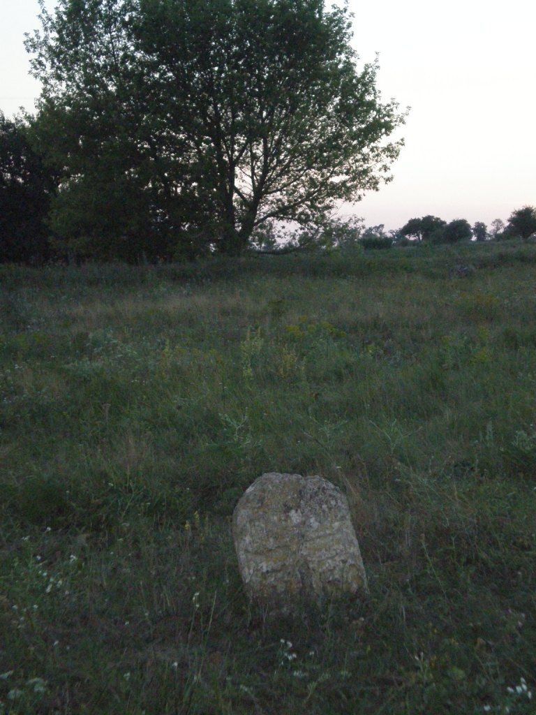 Хрест у селі Троянове (Новомиргородський район, Кіровоградська область, Україна)